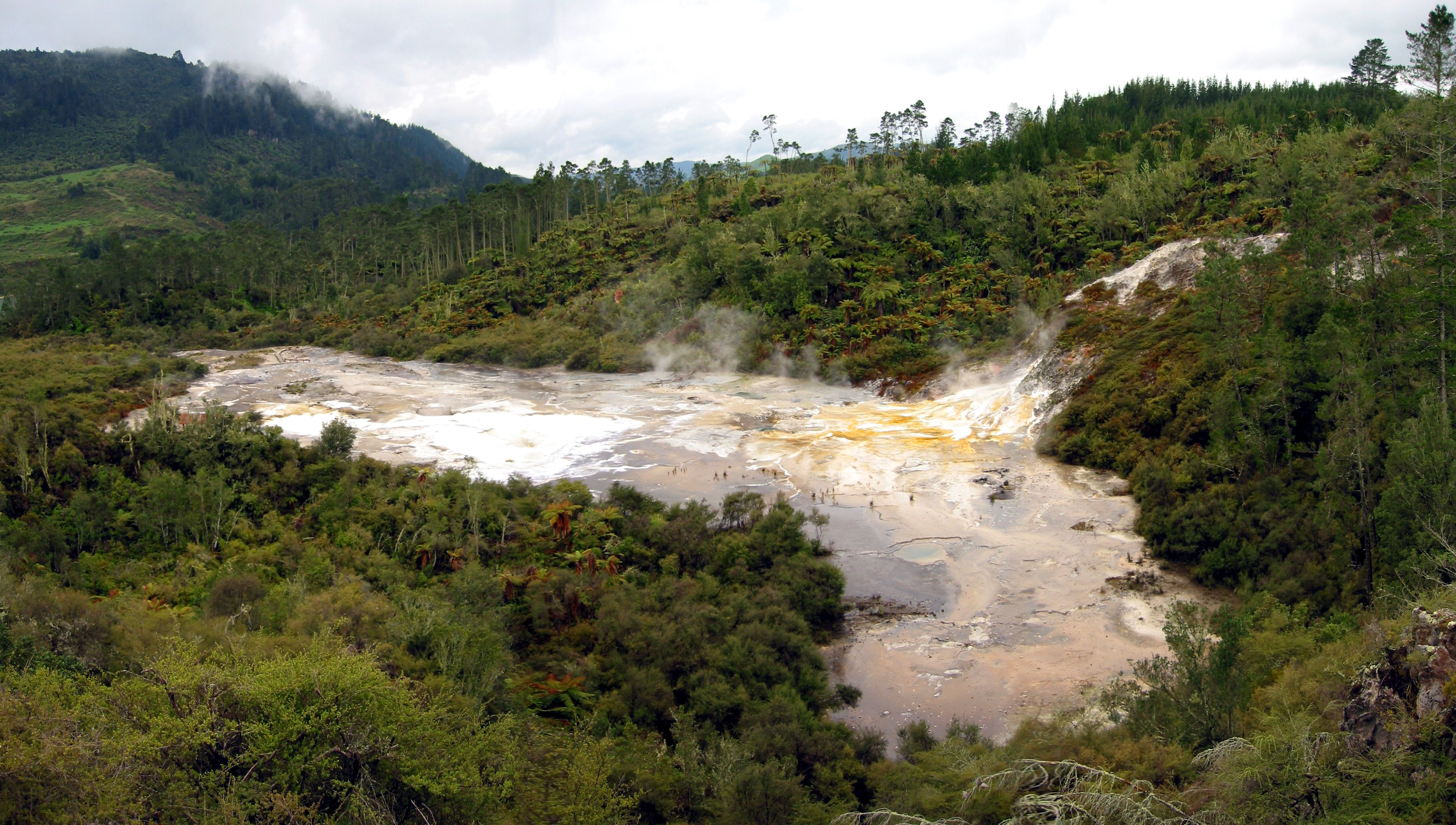 Emerald Terrace Orakei Korako. Compositie van eigen foto's gemaakt tijdens reis door Nieuw-Zeeland in 2004